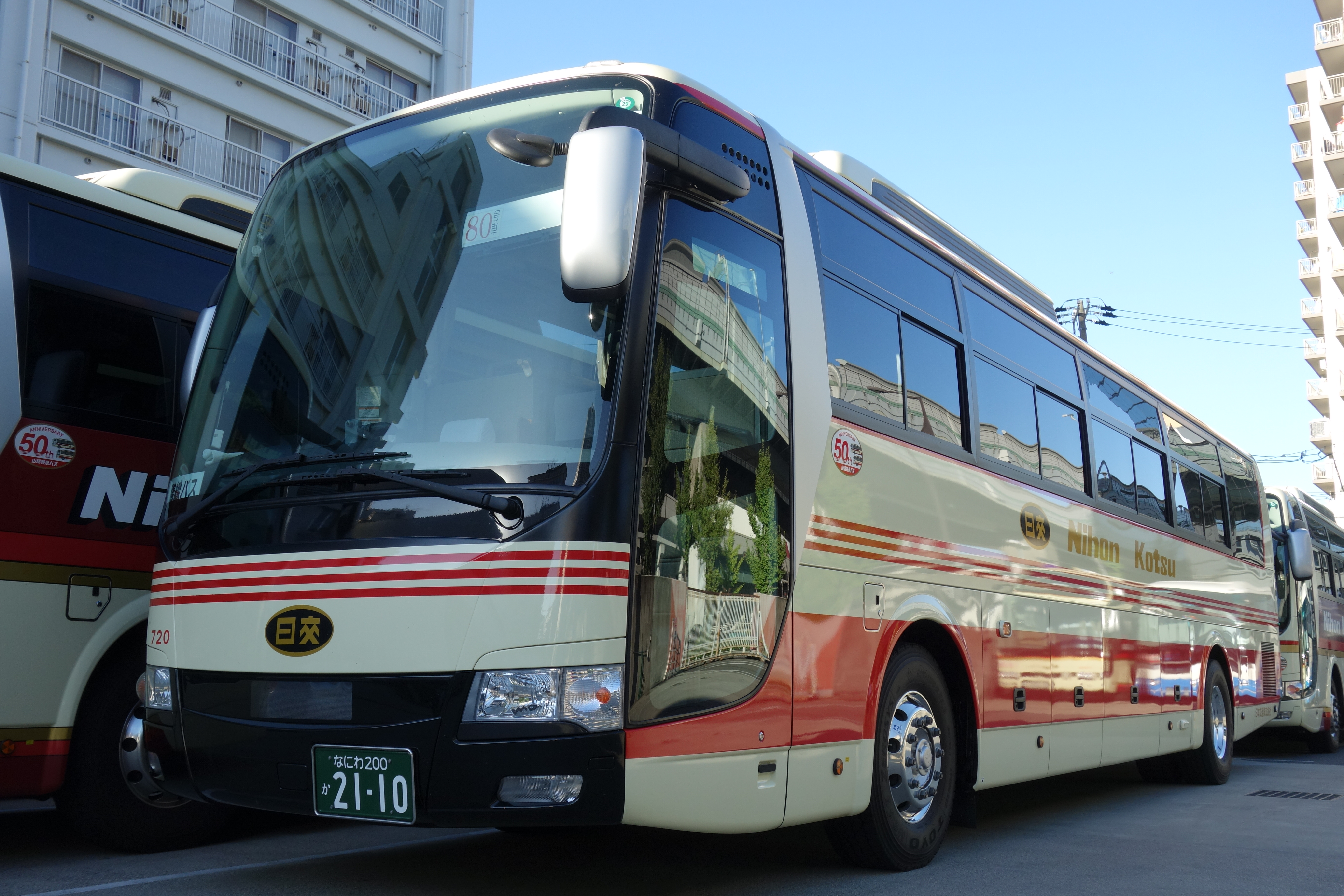 山陰特急50周年記念号